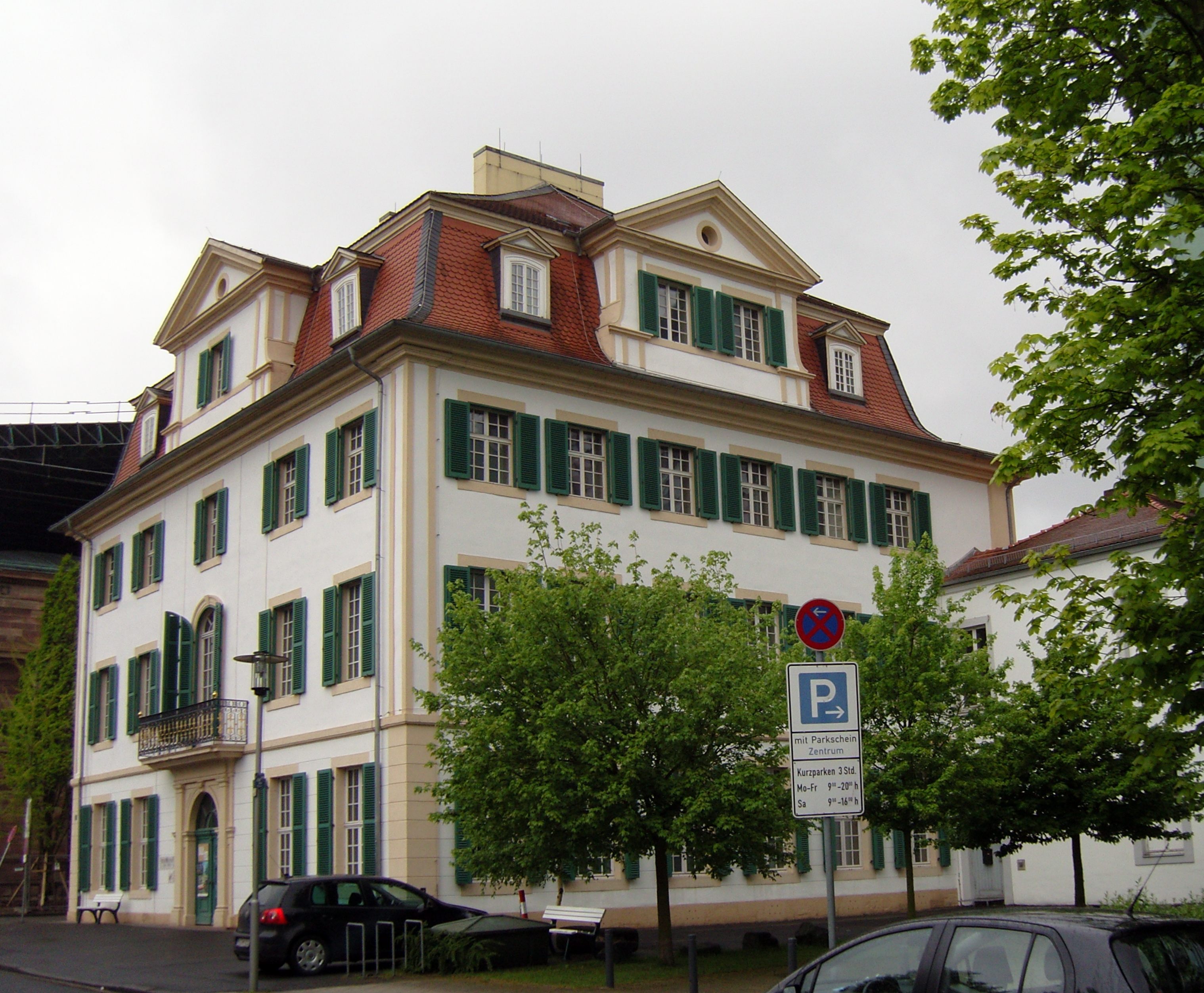 Das Palais Bellevue in Kassel.